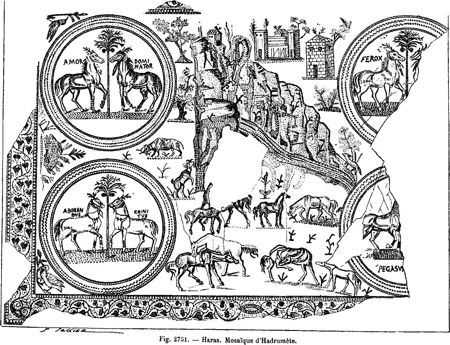 Mosaïque d'Hadrumète, représentant un haras. Jeunes juments et poulains en liberté au milieu d'arbustes.